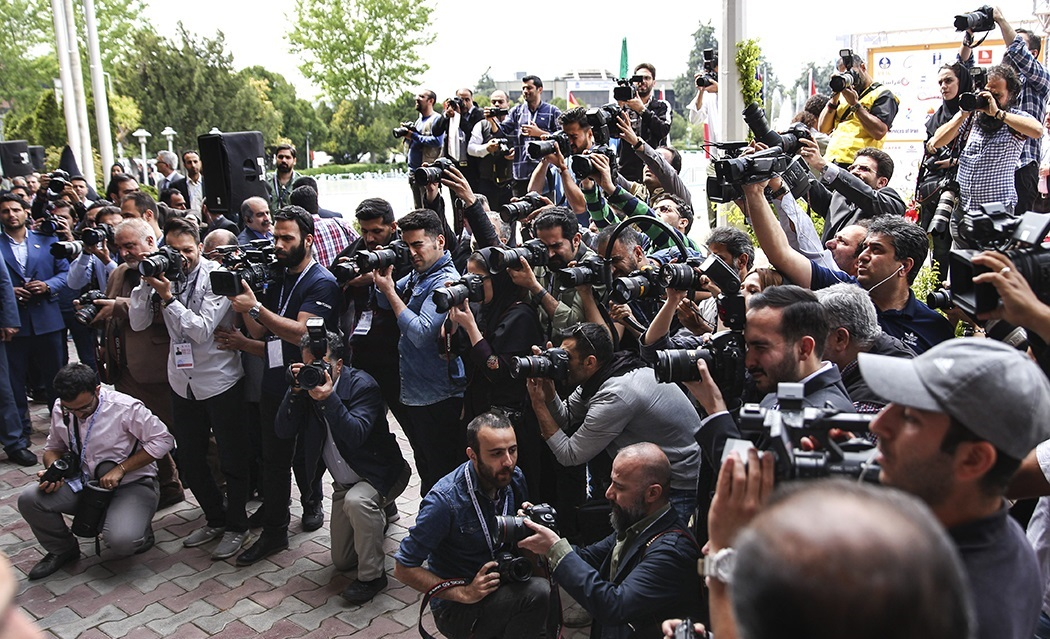 خبرنگاران ایرانی